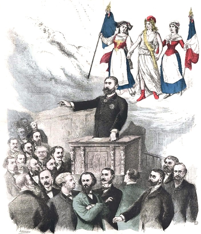 Détail de la couverture des Nouvelles chansons boulangistes de Villemer.